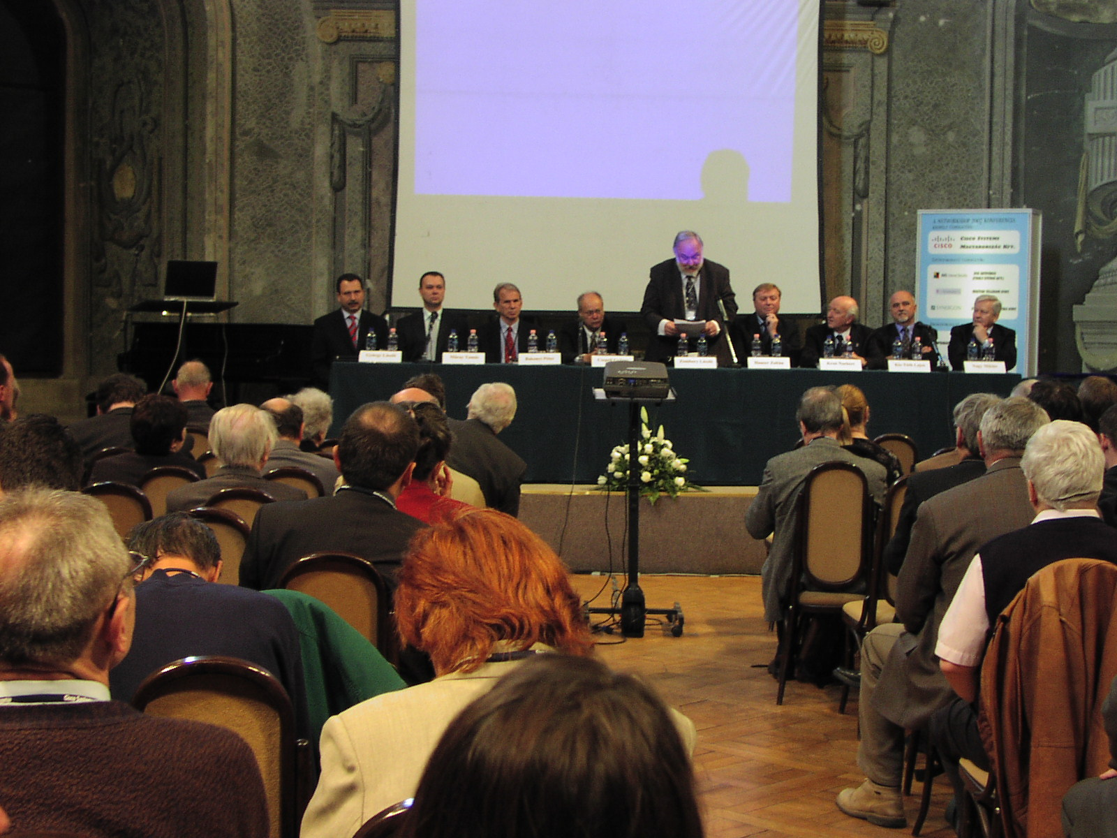 A 2007-es Networkshop nyitó plenáris ülése az egri Eszterházy Károly Főiskolán. Beszédet mond Dr. Zombory László, a HUNGARNET Egyesület elnöke